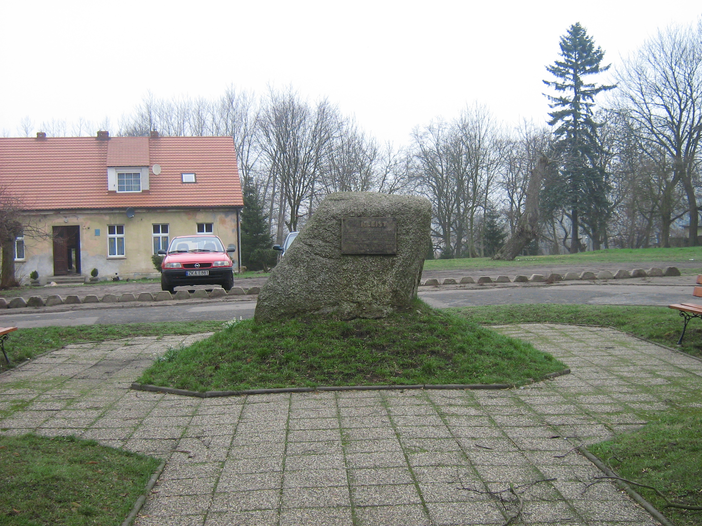 Pomnik poświęcony osobie Ewald Jürgen Georg von Kleist. Na pomniku jest tabliczka: "Ewald Georg Jurgen von Kleist W latach 1722-1747 dziekan kapituły kamieńskiej - 11 października 1745 roku w Kamieniu Pomorskim dokonał jako pierwszy na świecie próby z kondensatorem elektrycznym przy pomocy tzw. butelki kleista. W 300-tną rocznicę urodzin mieszkańcy Kamienia Pomorskiego 10 VI 2000"